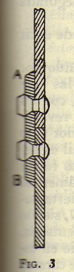 Cubrejuntas que se usa para unir las planchas del forro de un barco metálico.